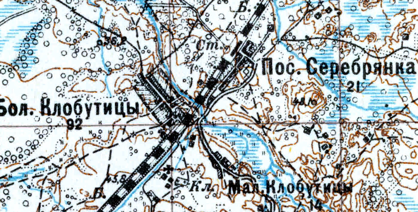 Топографическая карта Ленинградской области, квадрат VIc-28 (Луга), деревня Клабутицы и посёлок Серебрянка